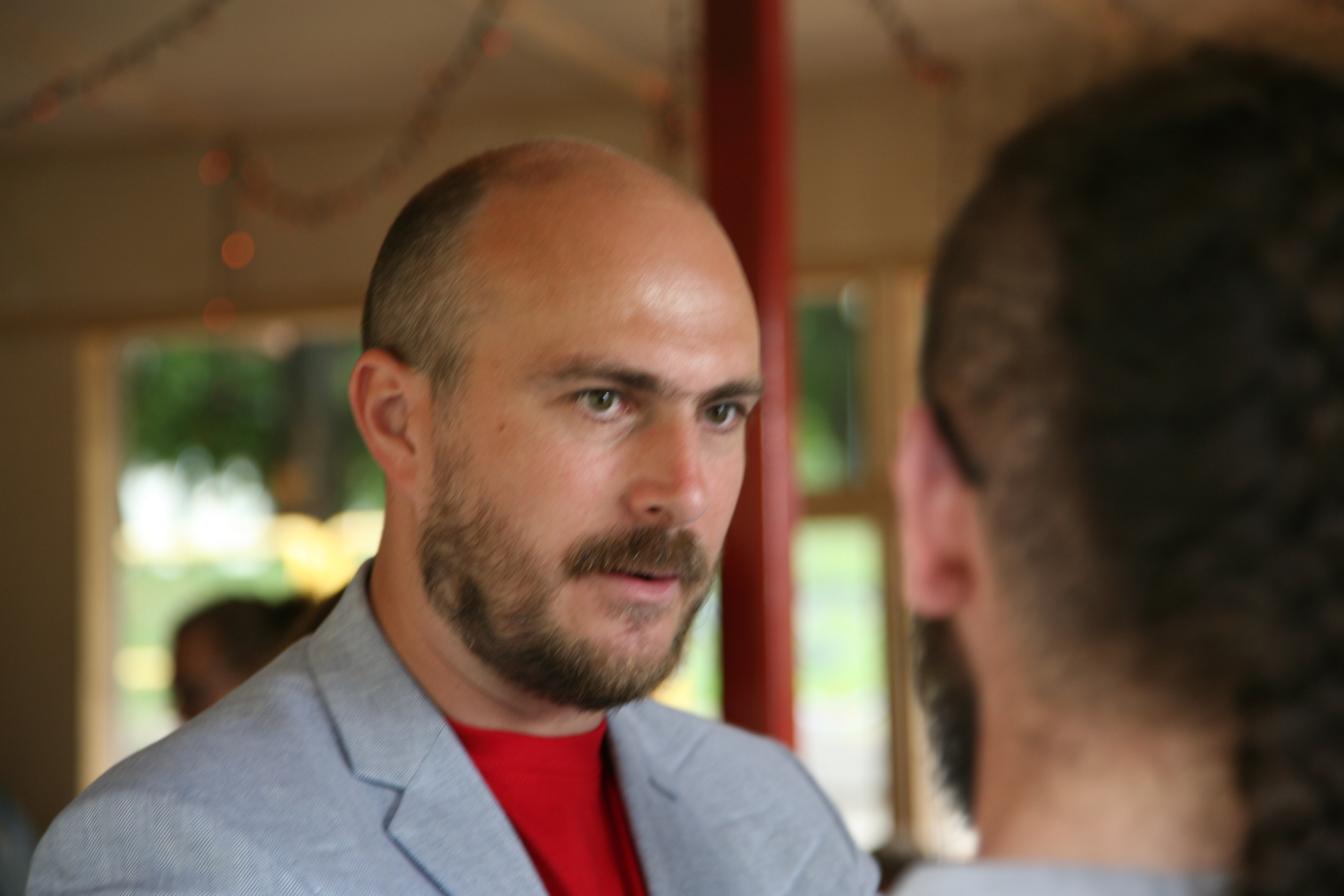 MAFUNi 2015. aasta konverentsi õhtune vastuvõtt Tartus. SA Fenno-Ugria juhatuseliige Oliver Loode.